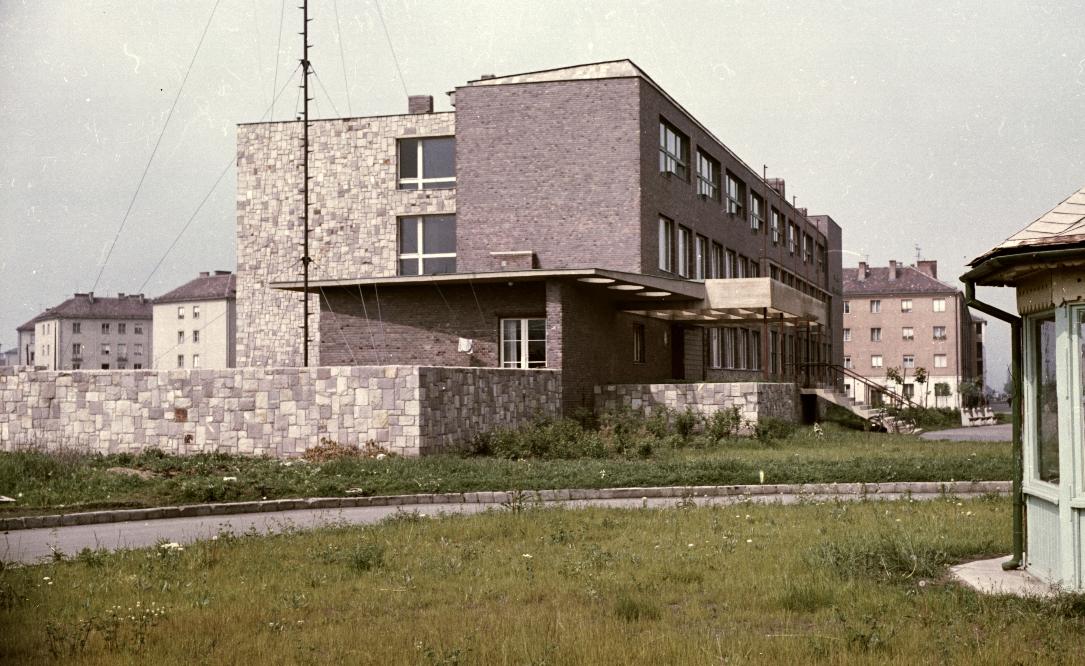 Egressy Béni (Lenin) út 1. Irinyi János Vegyipari Technikum volt ebből lett a Irinyi János Református Szakgimnázium, Szakközépiskola és Diákotthon. Location: Hungary Tags: school, colorful Title: Egressy Béni (Lenin) út 1. Irinyi János Vegyipari Technikum.